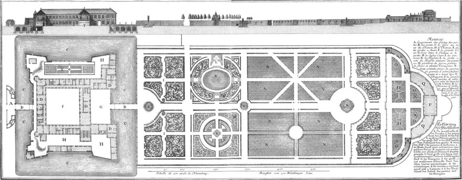 Grundriss des Schlossparks Gaibach, des Schlosses, Stich von Salomon Kleiner